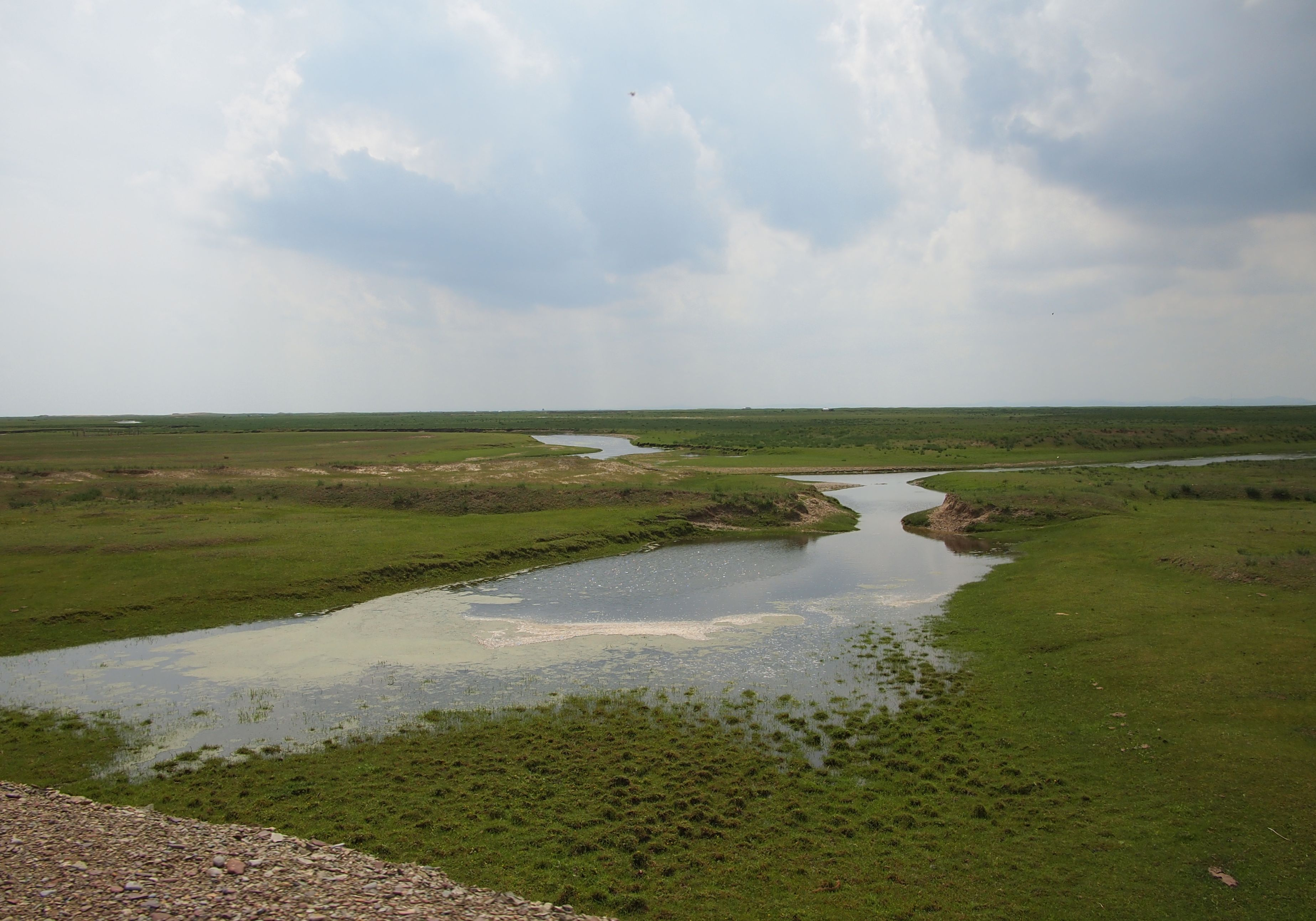 贡格尔草原 - Gongger Grasslands - 2011.06